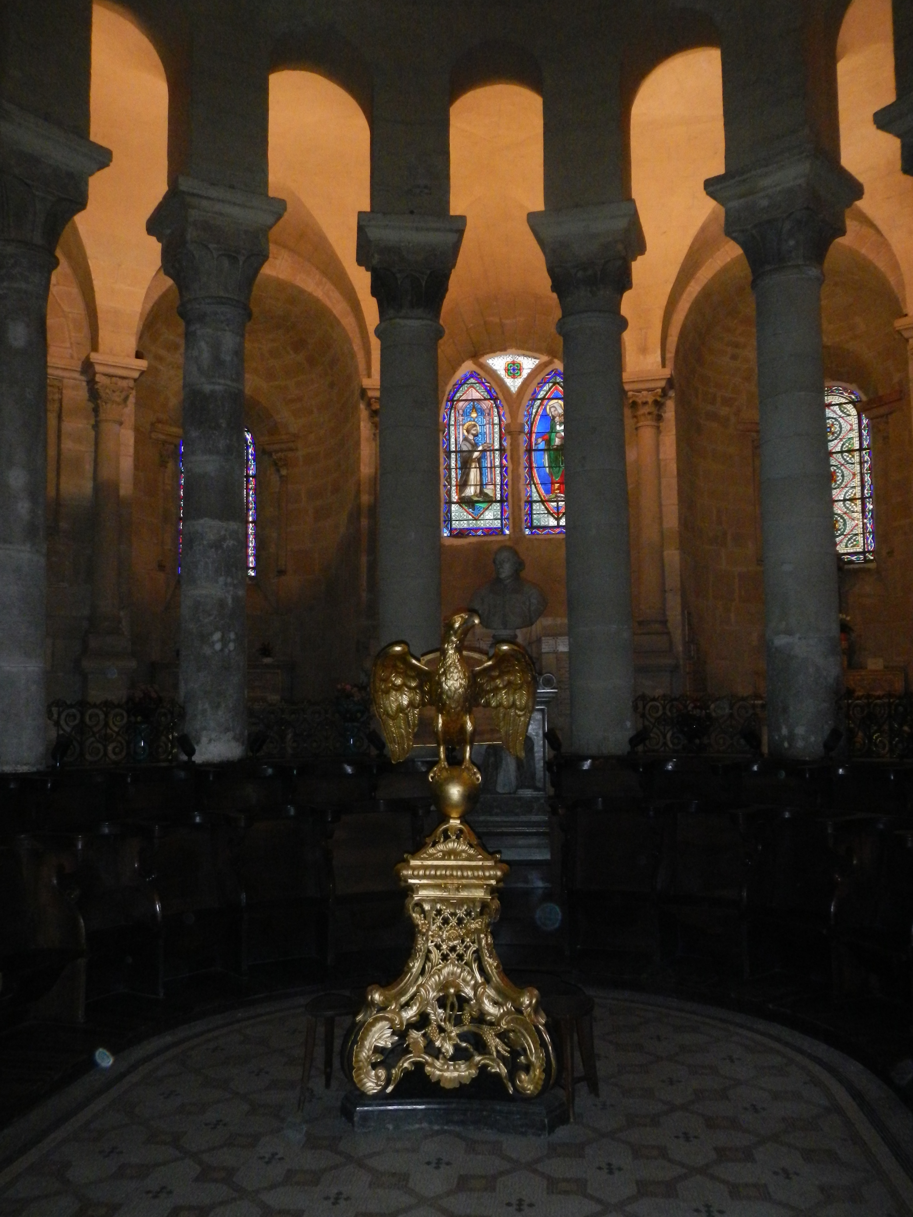 Abside de la cathédrale saint Apollinaire de Valence.